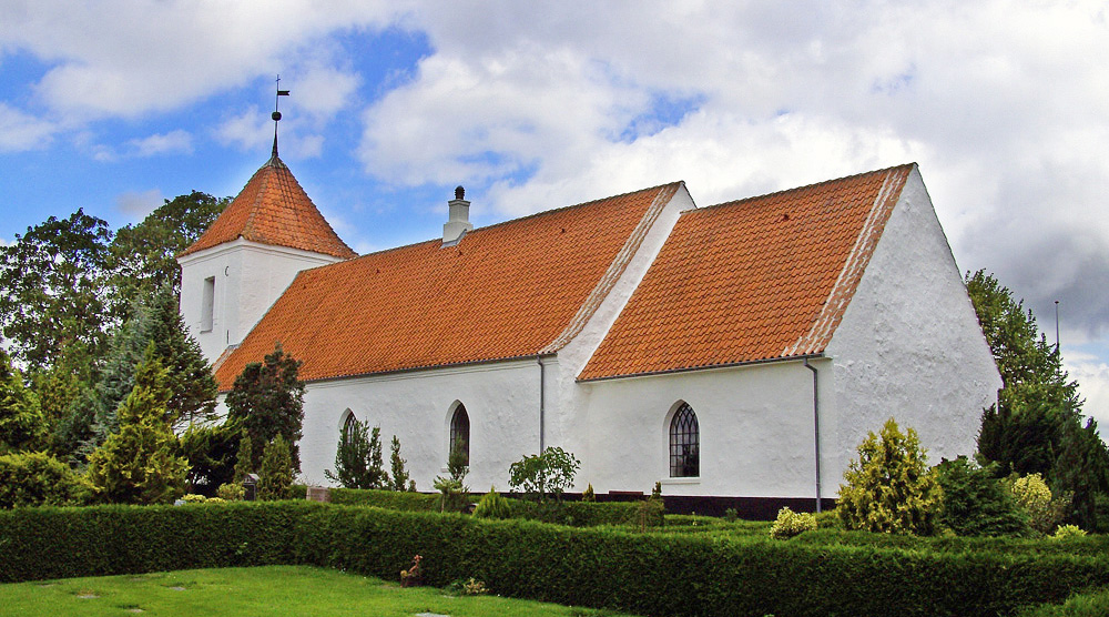 fra sydøst